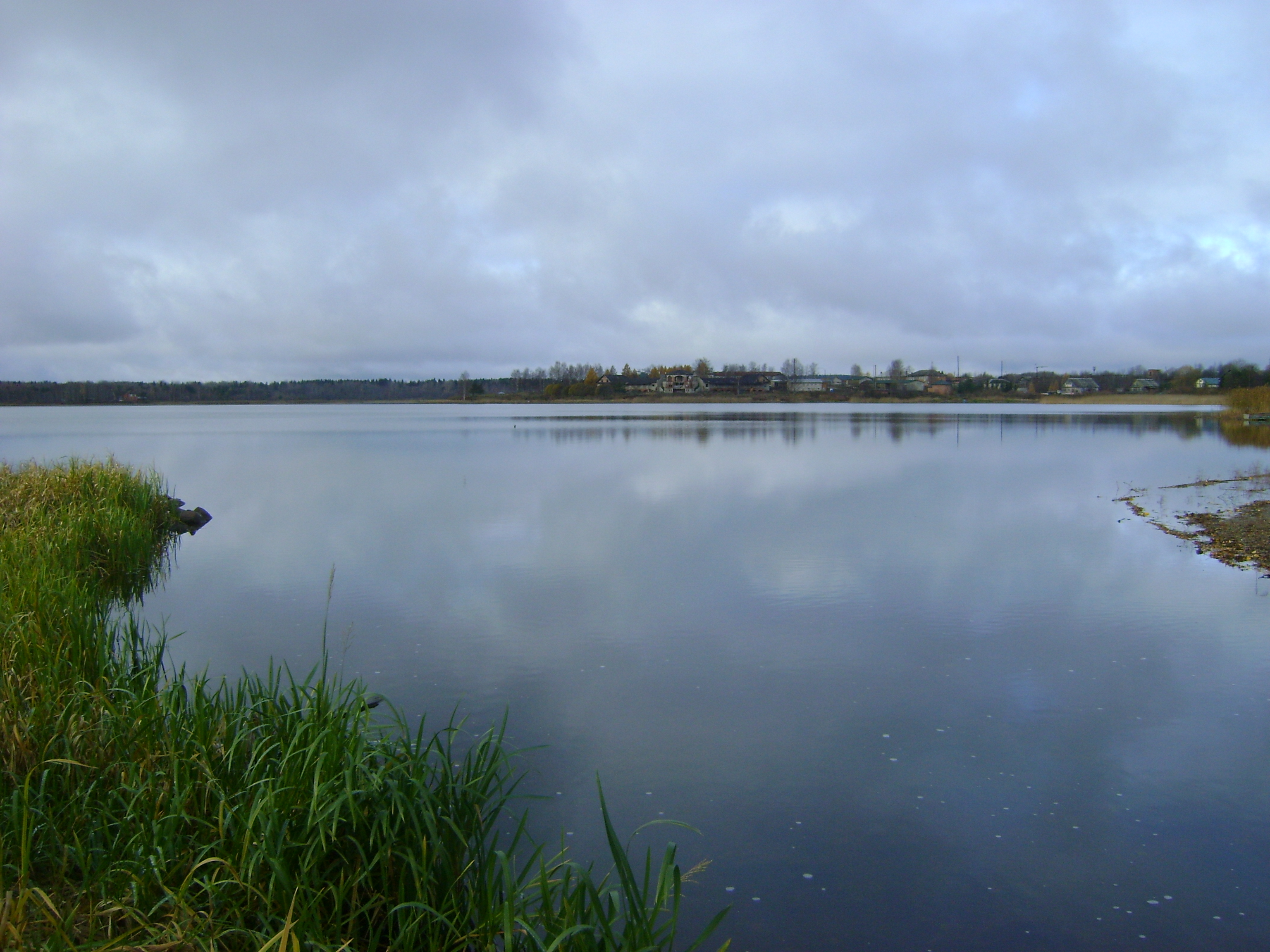 Устье Свияги2 в Сиверском озере